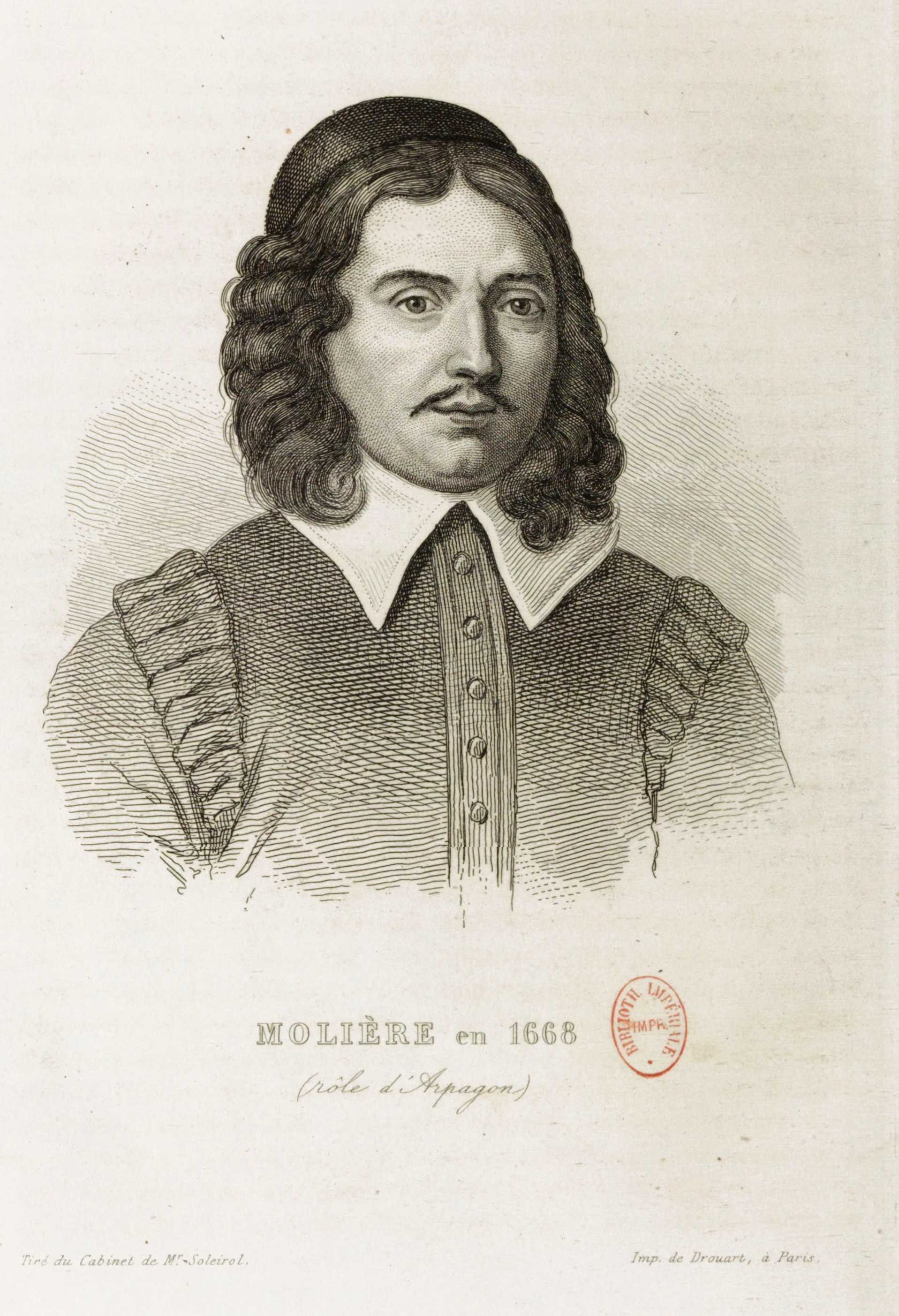 Gravure commandée par Soleirol d'après un portrait au crayon de Sophie Chéron présumé représenter Molière dans le rôle d'Harpagon